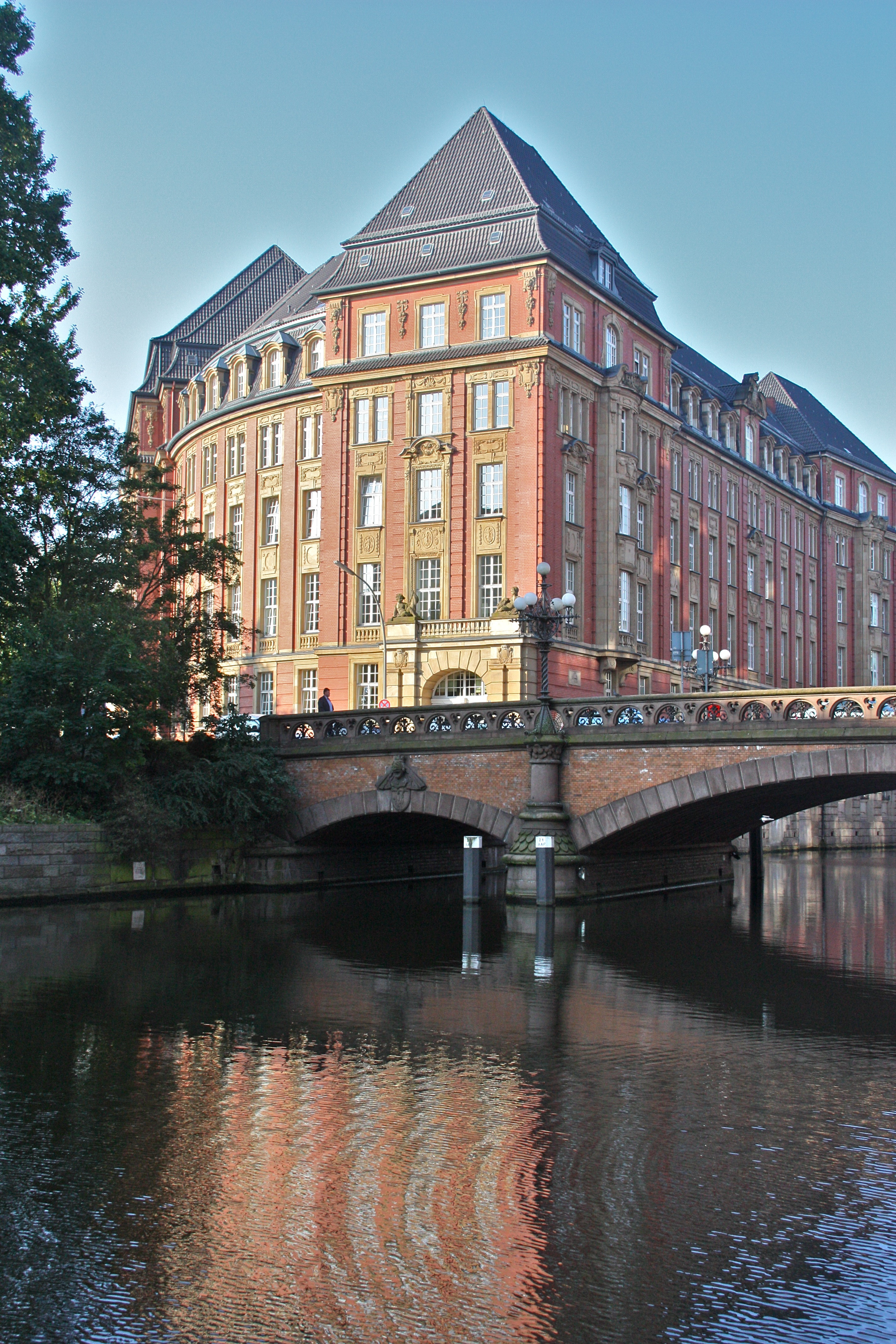 Hamburg, Bürogebäude Rödingsmarkt 2, "Alte Oberfinanzdirektion", Blick über Alster und Heiligengeistbrücke This is a photograph of an architectural monument.